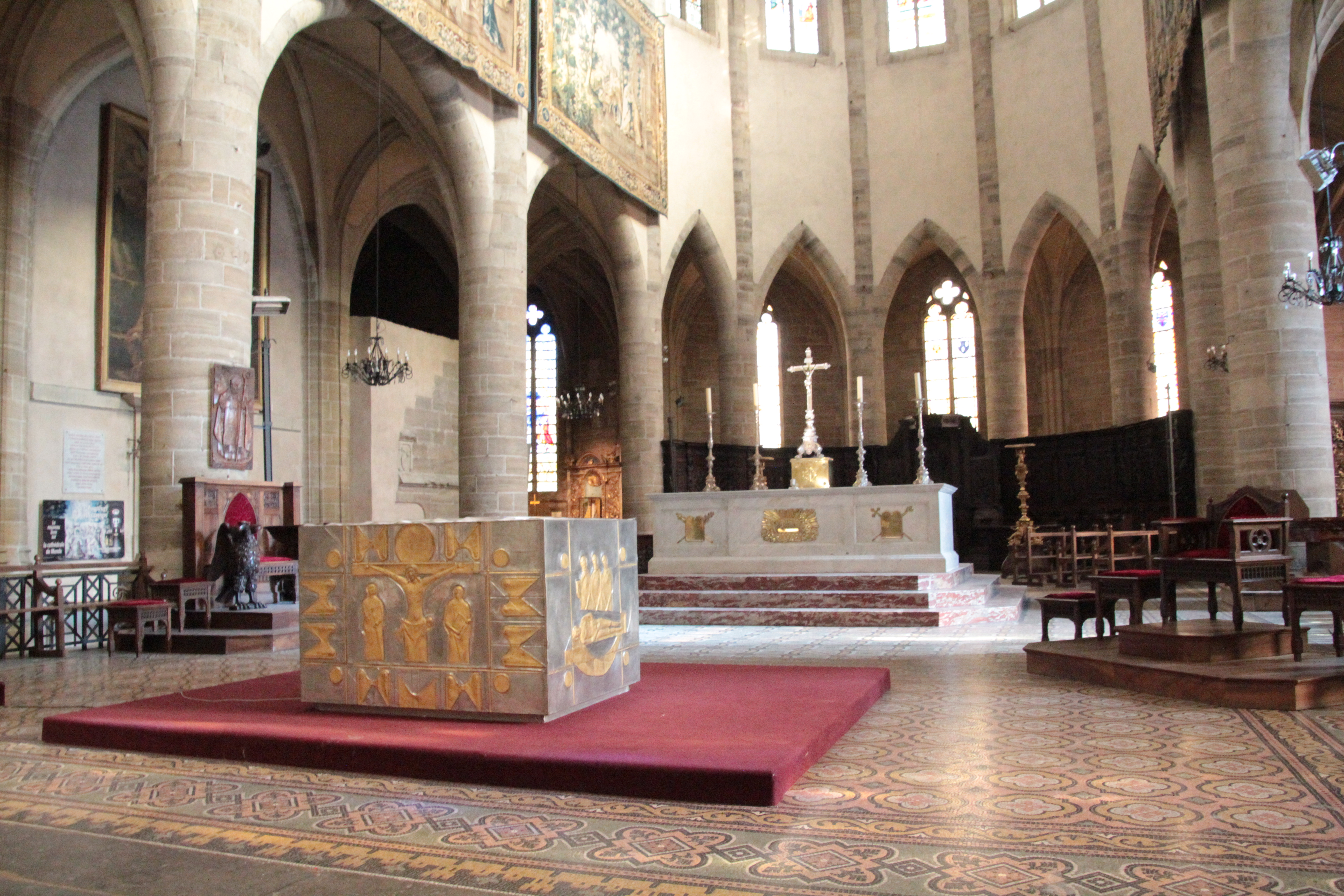 Le chœur et l'autel de la cathédrale de Mende, Lozère (France)